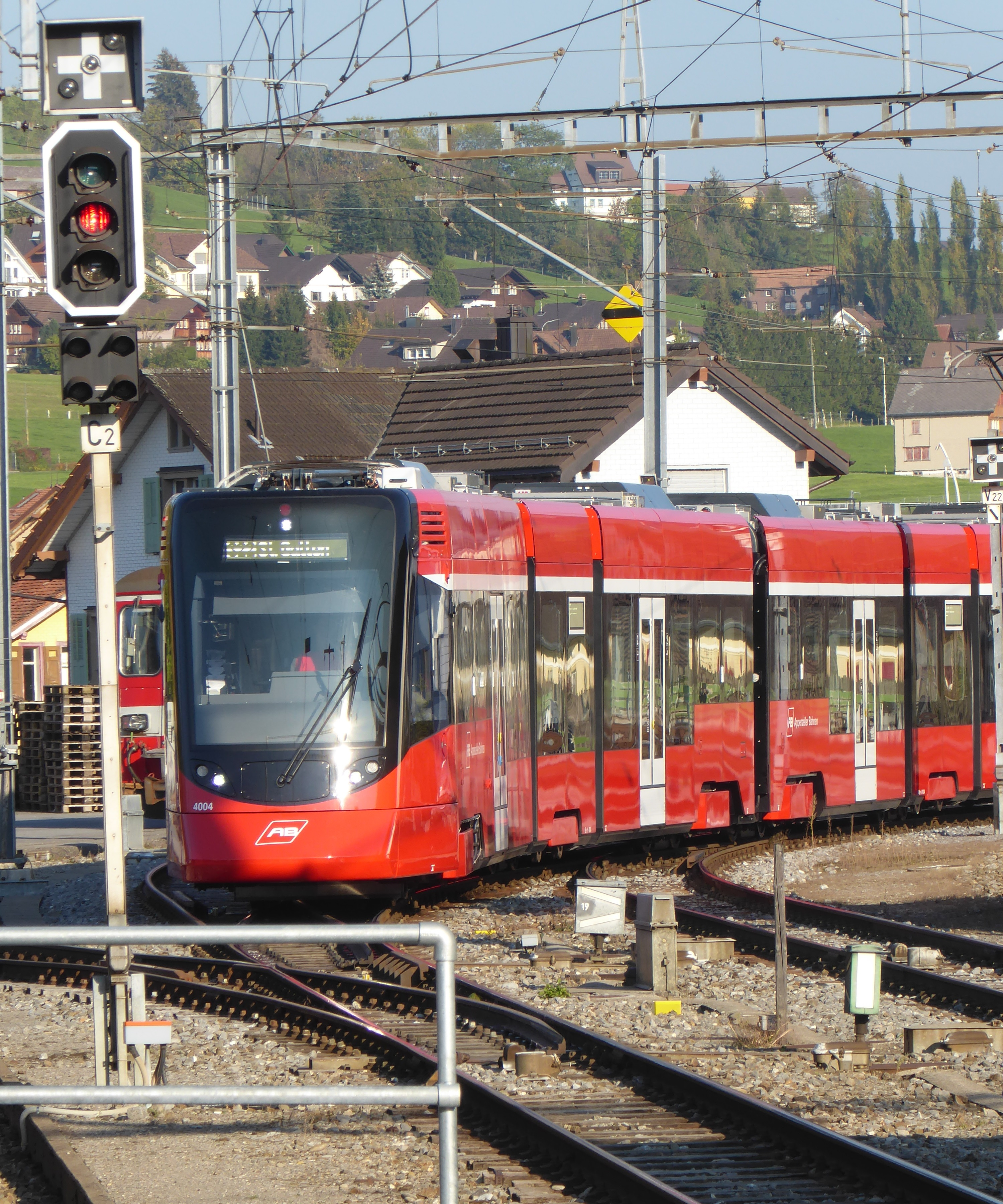 ABe 8/12 „Tango“ der Appenzeller Bahnen (AB) bei der Einfahrt in dem Bahnhof Appenzell